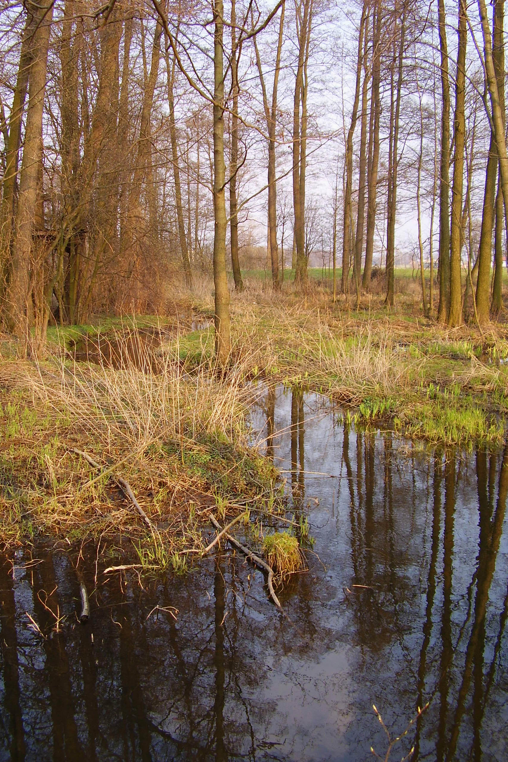 Łęgi - zakola strumienia, od których prawdopodobnie pochodzi nazwa wsi Łękawica